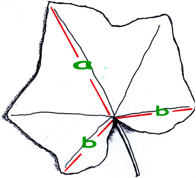 Efeublatt (Handzeichnung nach Vorlage)